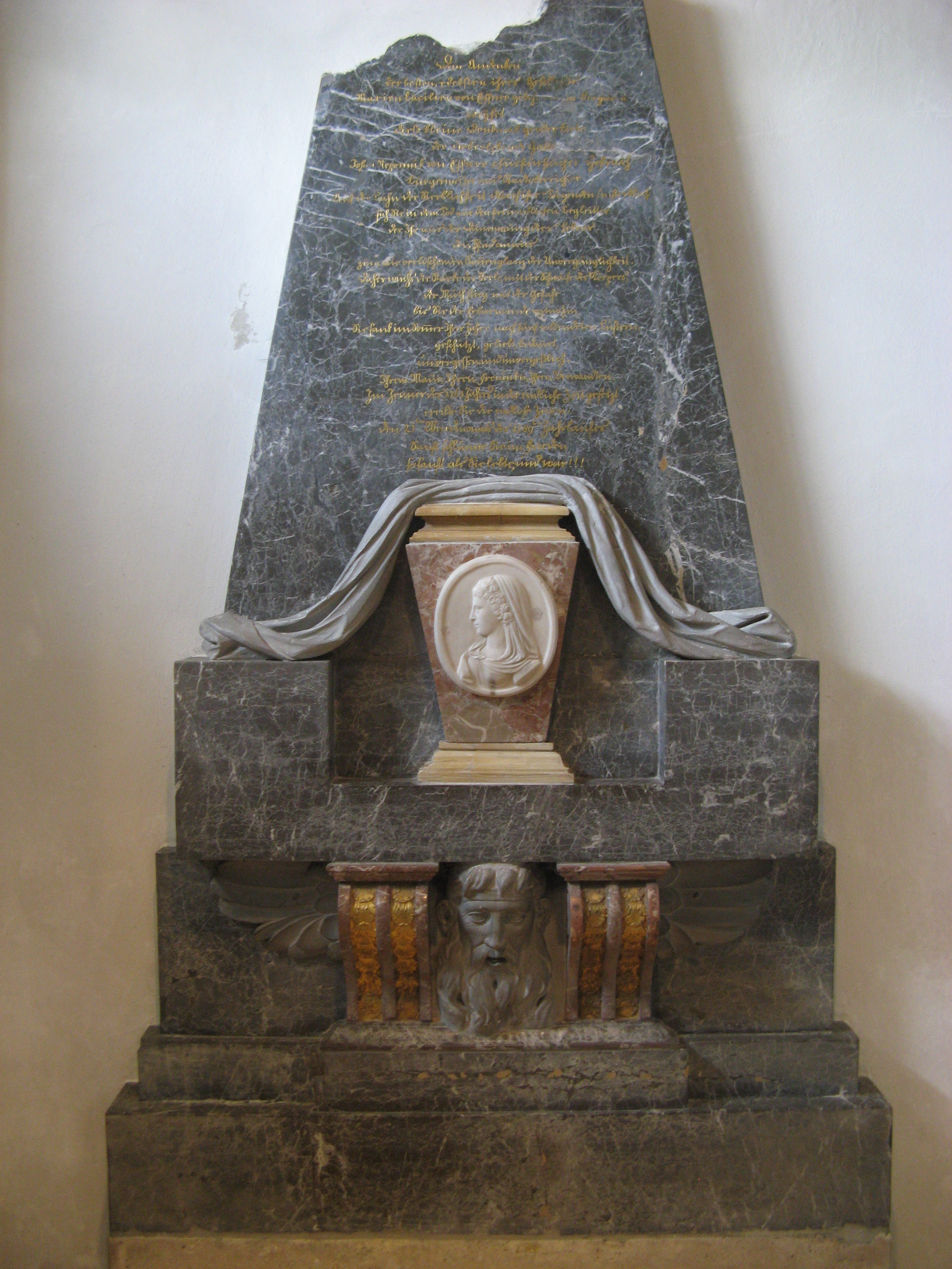 Epitaph der Cäcilie von Effner in der Pfarrkirche St. Michael Perlach, gestorben am 23. November 1789